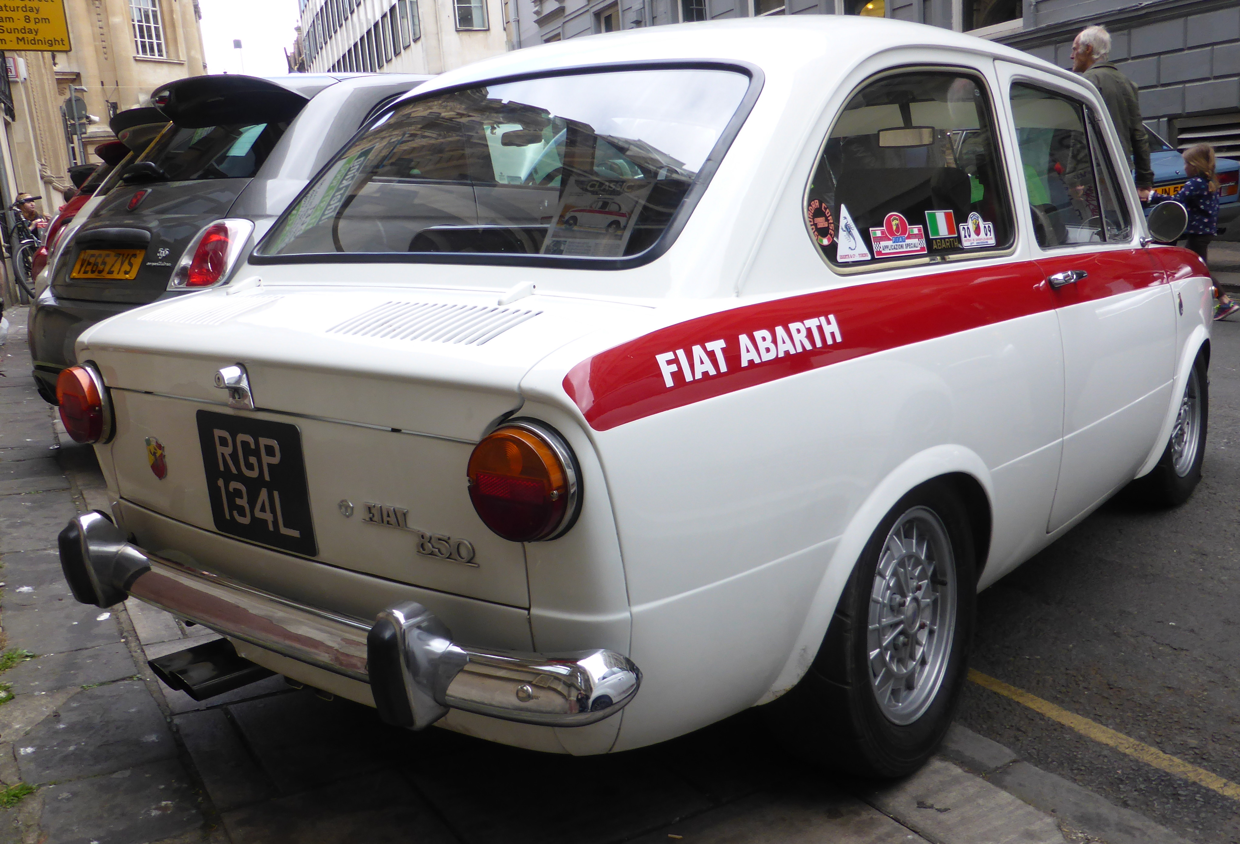 Bristol Italian AutoMoto Festival